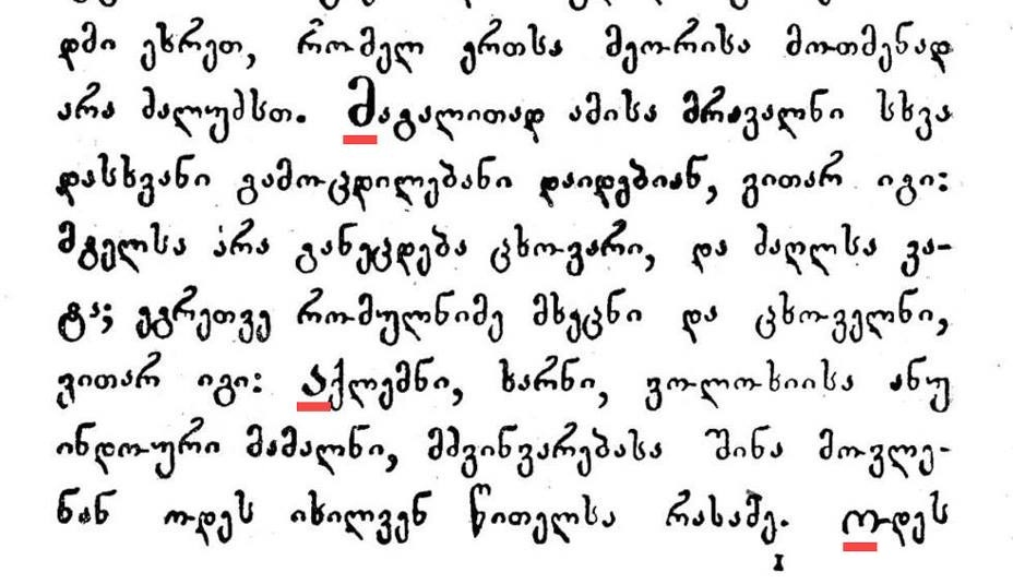 პეტერბურგის სტამბის ქართული შრიფტი მხედრულის მთავრული ასოებით.